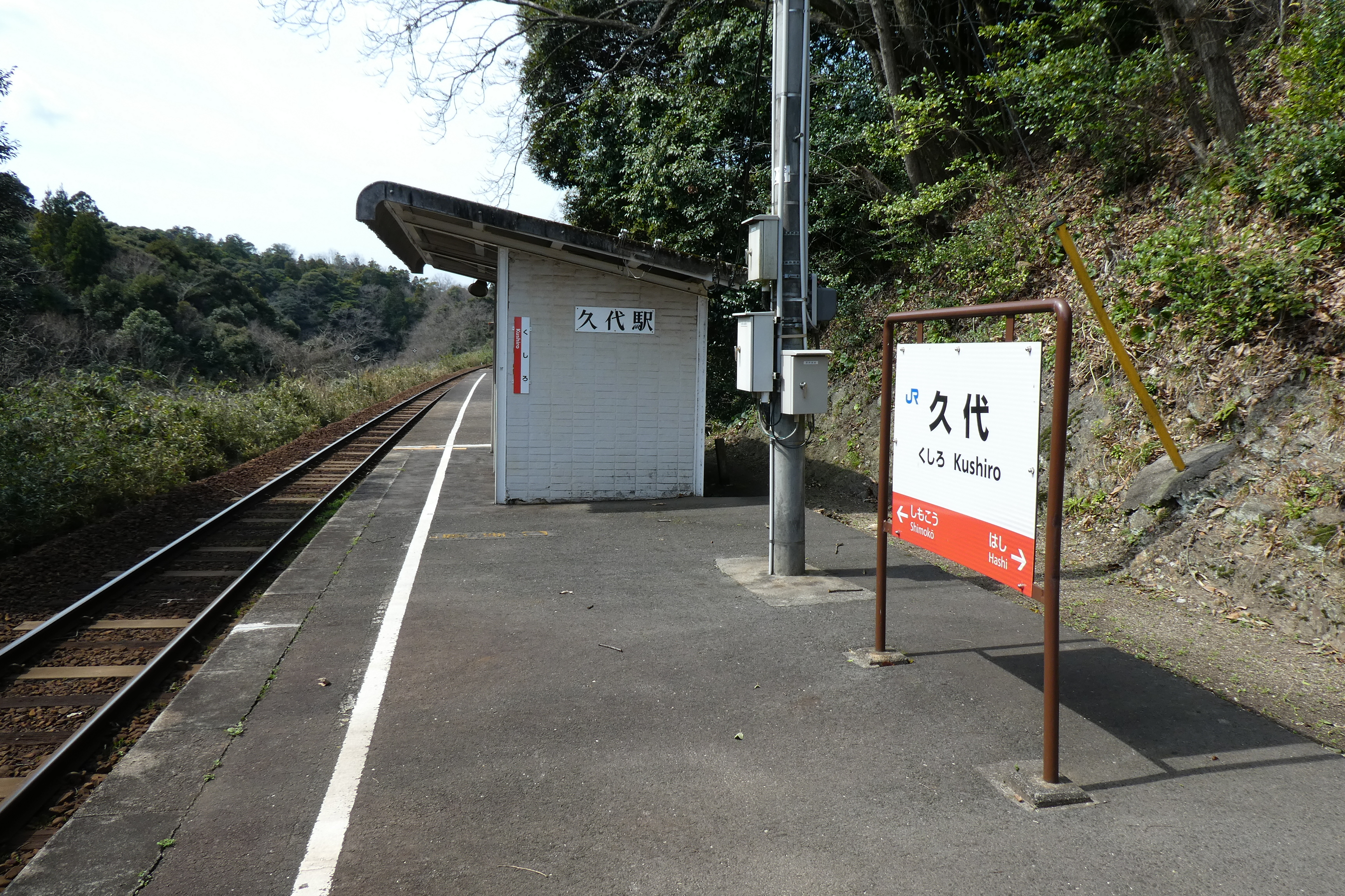 山陰本線久代駅